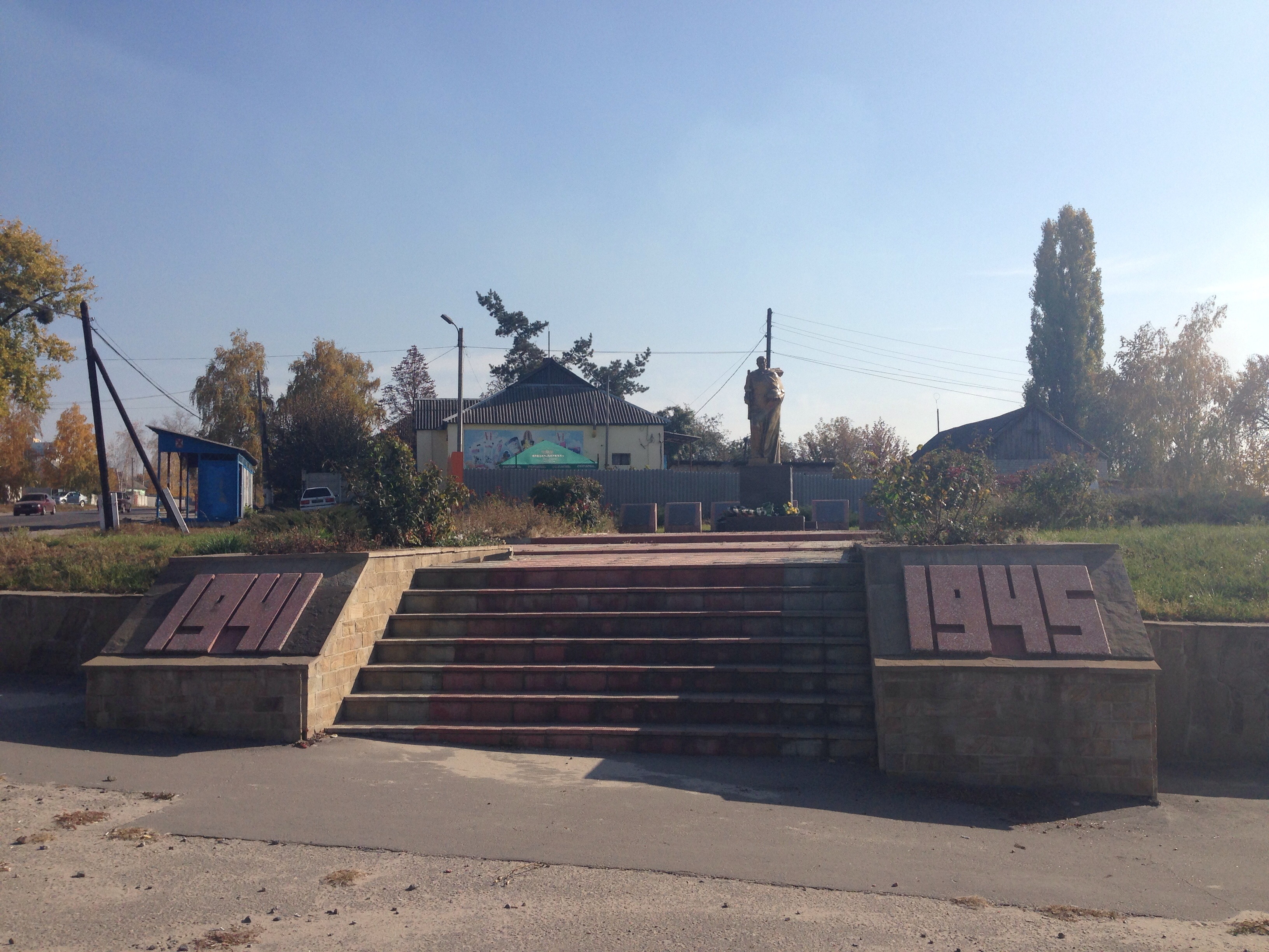 Братська могила радянсь-ких воїнів. Поховано 245 воїнів., Солоницівка, вул. Леніна